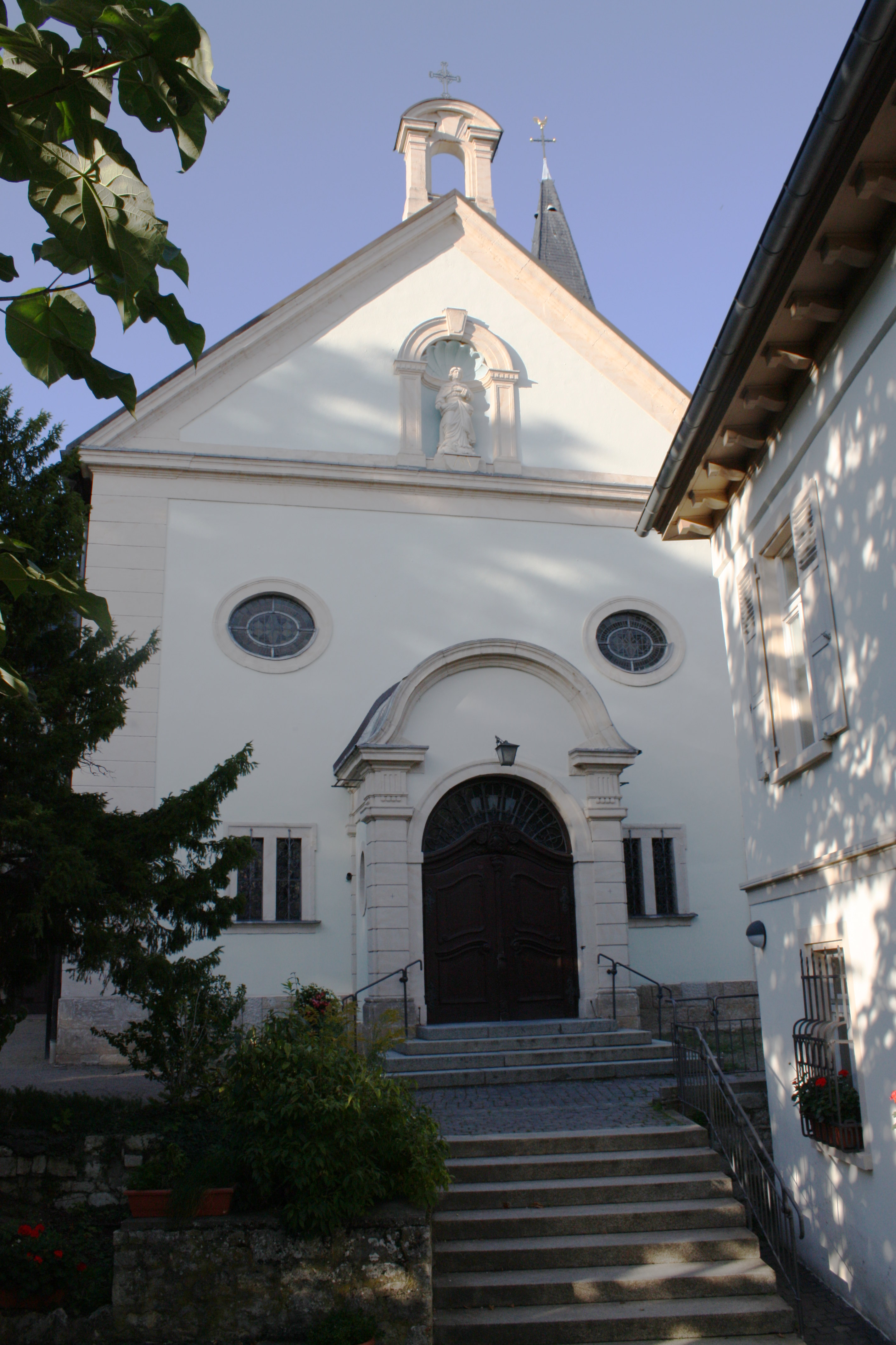 Portalansicht der kath. Pfarrkiche Maria Heimsuchung in Mainz Laubenheim. Rechts im Bild das kath. Pfarrhaus.